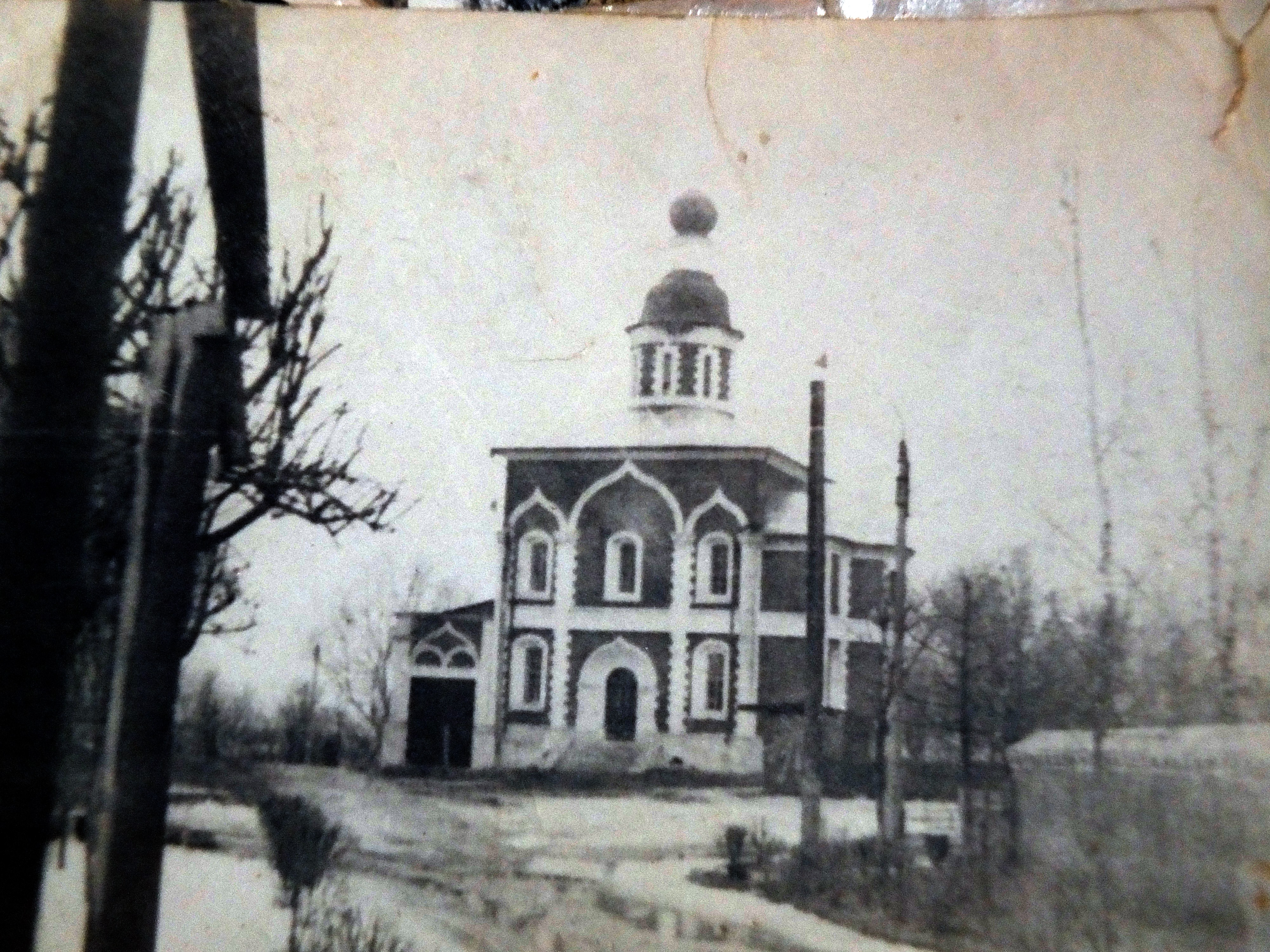 Церковь Петра и Павла 80-е